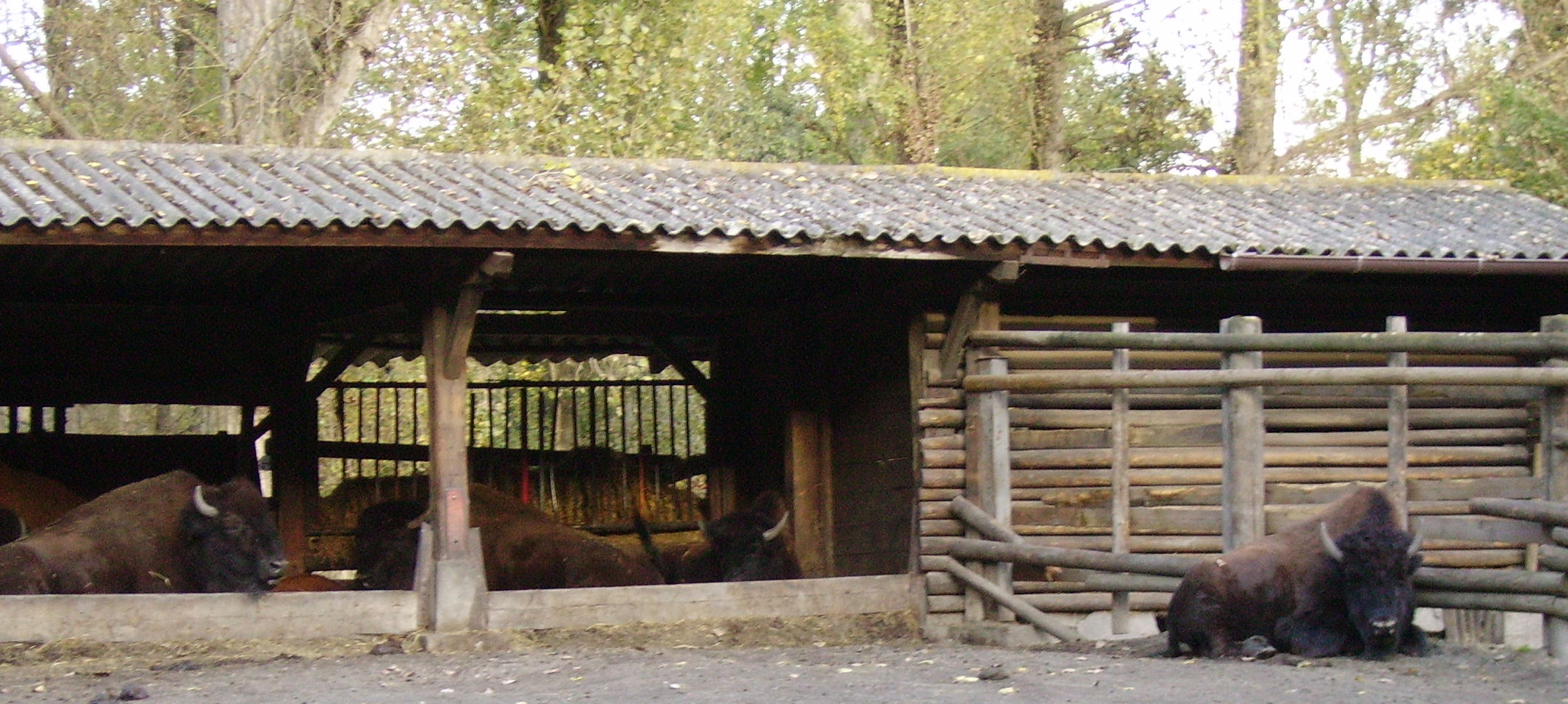 Wildpark of Ludwigshafen-Rheingönheim in Rhineland-Palatinate (Germany)